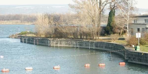 Kaimauer bei der Wehranlage Nußdorf